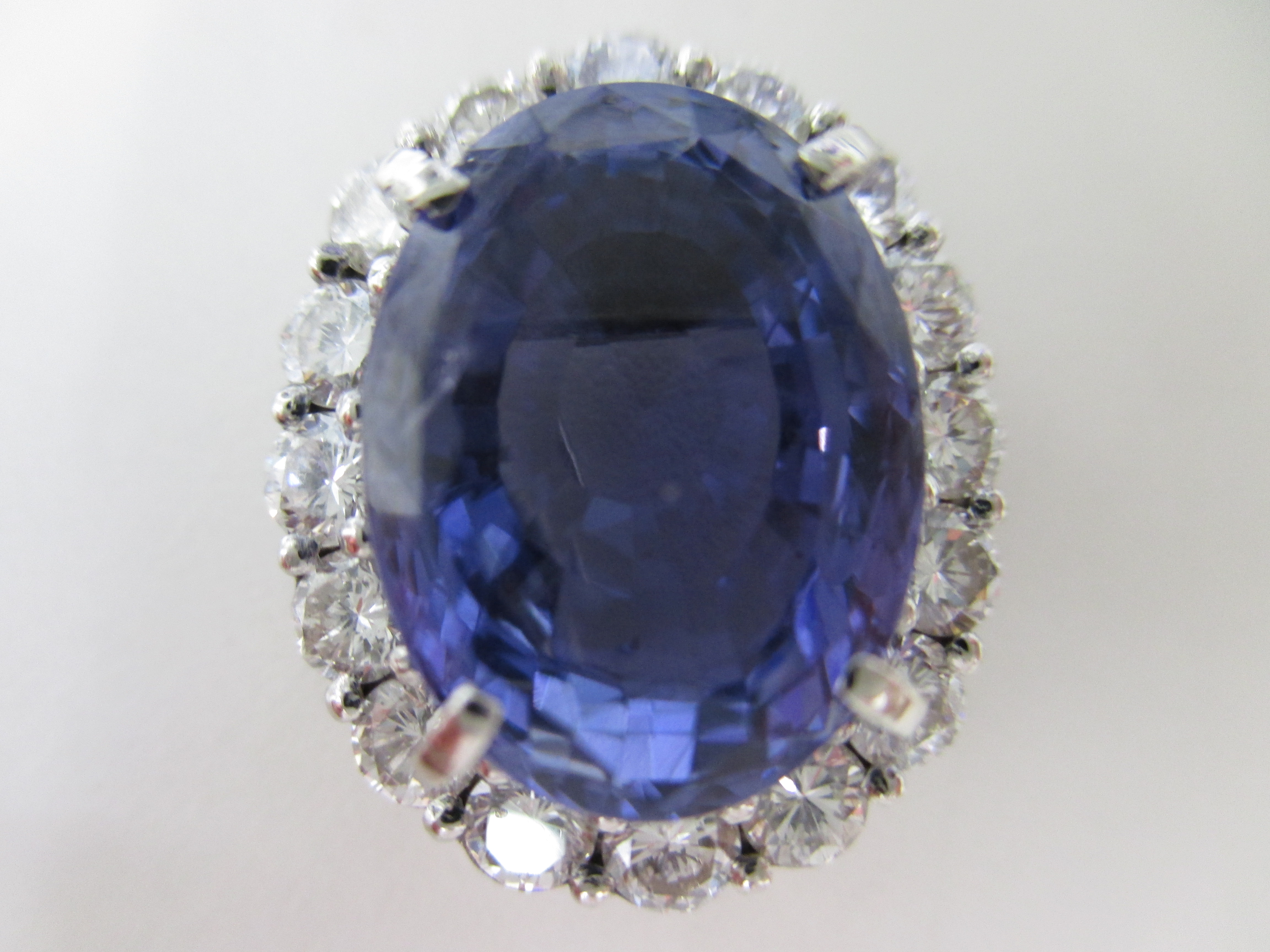 サファイアの宝石